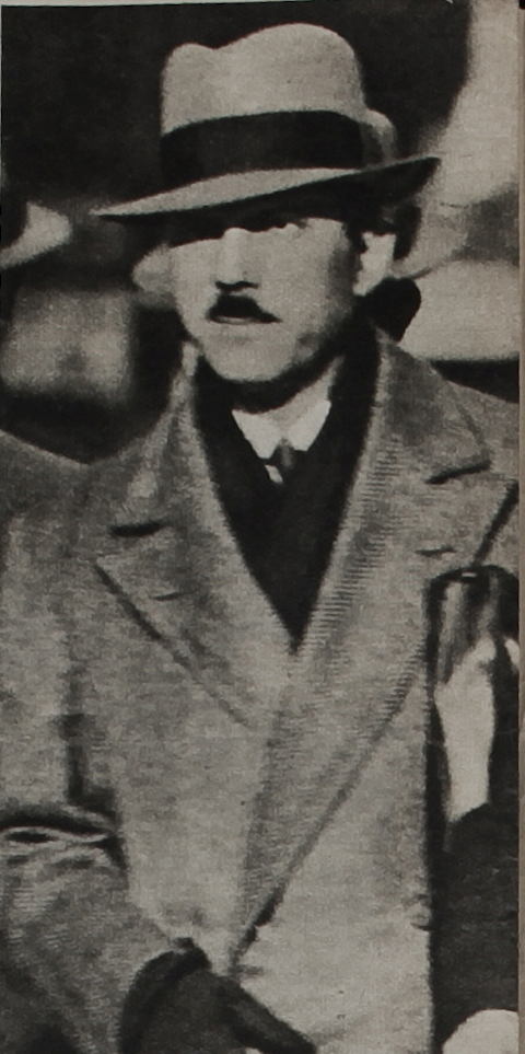 Pierre Bonny, dans Police Magazine du 22 avril 1934.